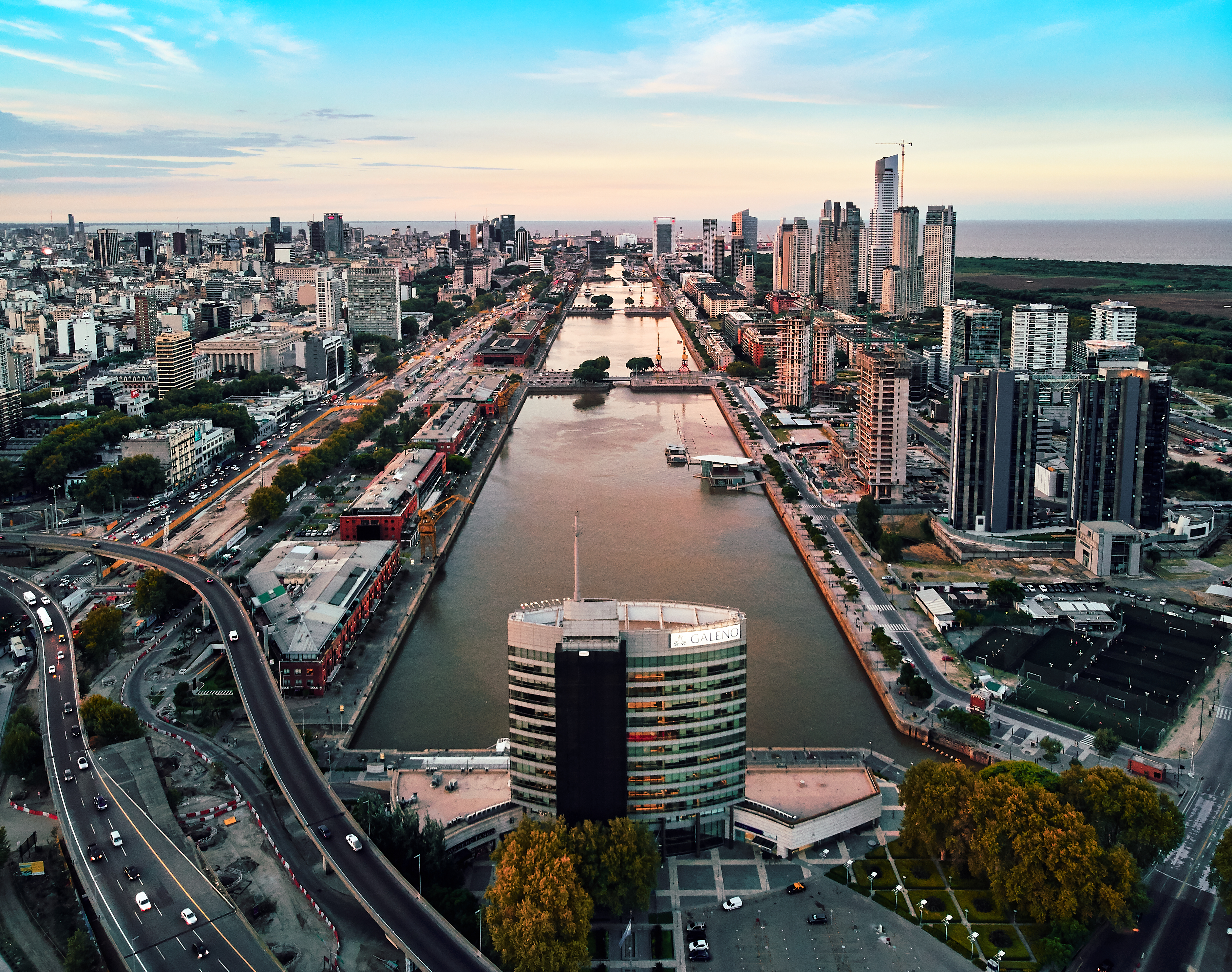 Puerto Madero, Buenos Aires